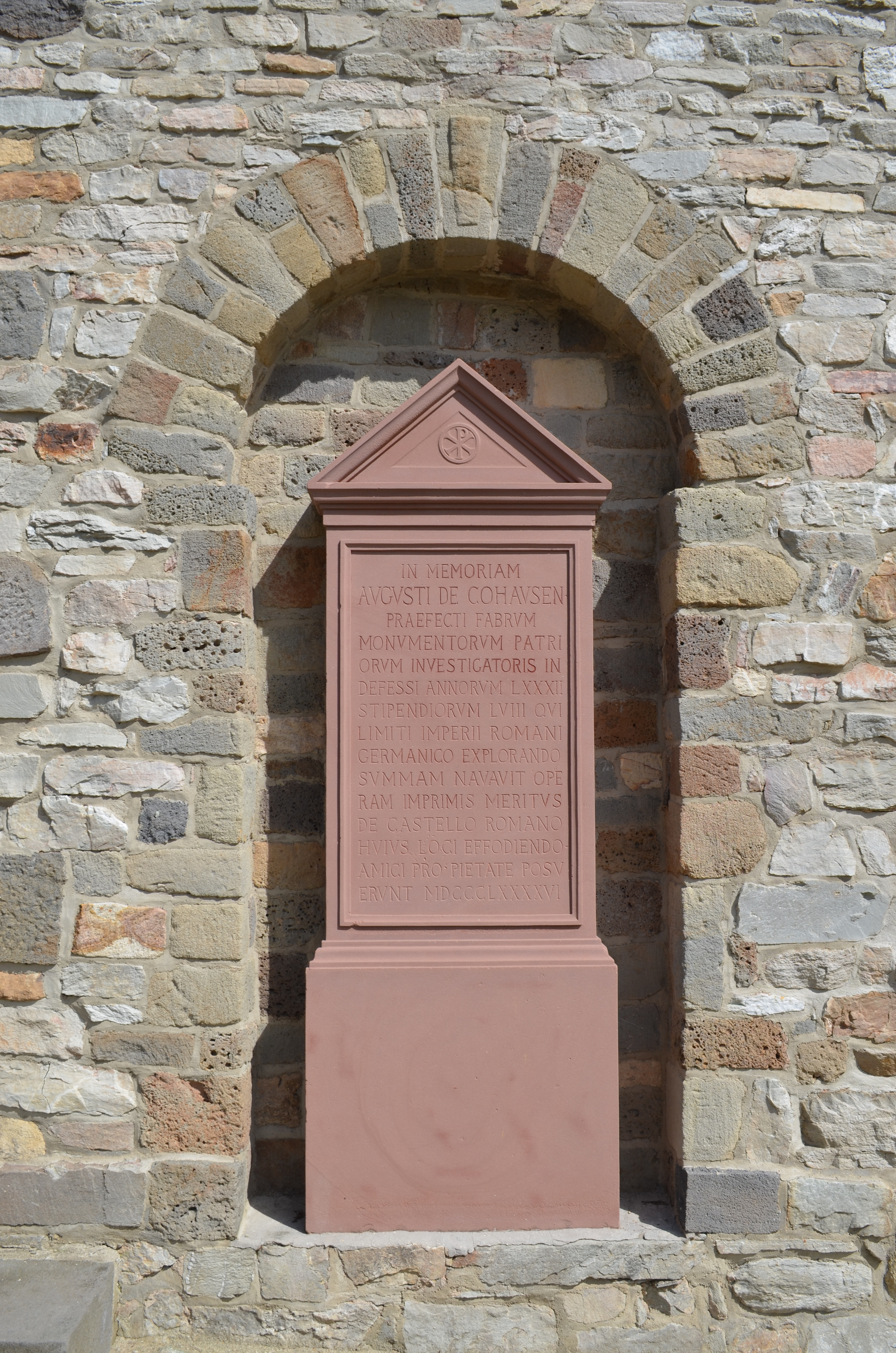 Saalburg, Gräberhaus, Gedenkstein für Karl August von Cohausen